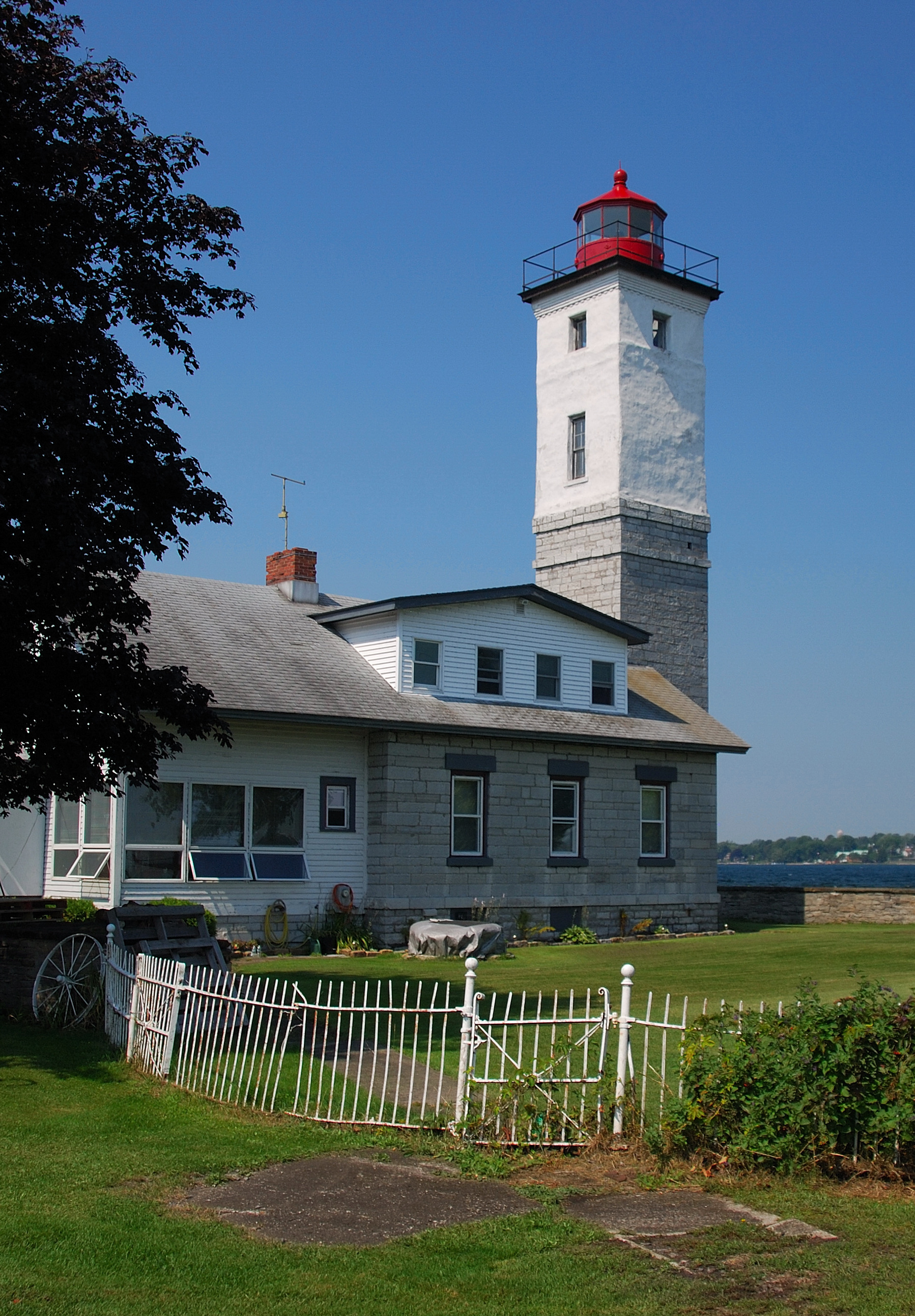 Ogdensburg Lighthouse